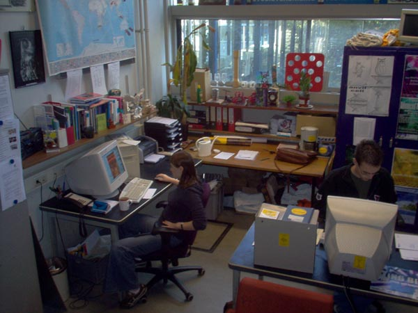 Deze foto is door mijzelf eerder vandaag gemaakt. Ik heb toestemming van de personen die op de foto staan om deze foto, met hen erop, op wikipedia vrij te geven.